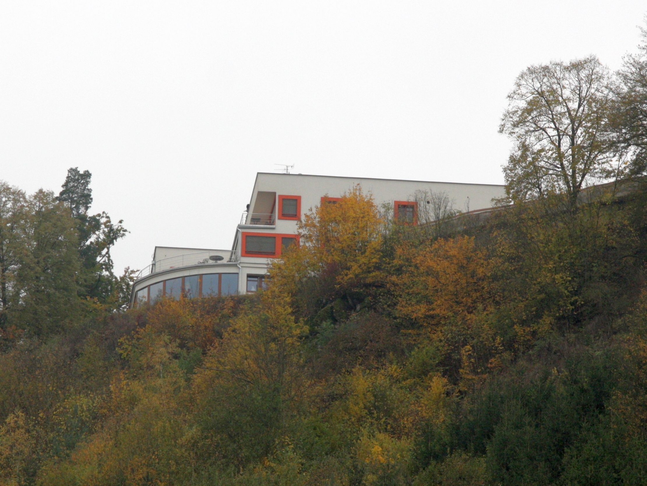 Žďárec - samota Havlov, pohled od řeky.